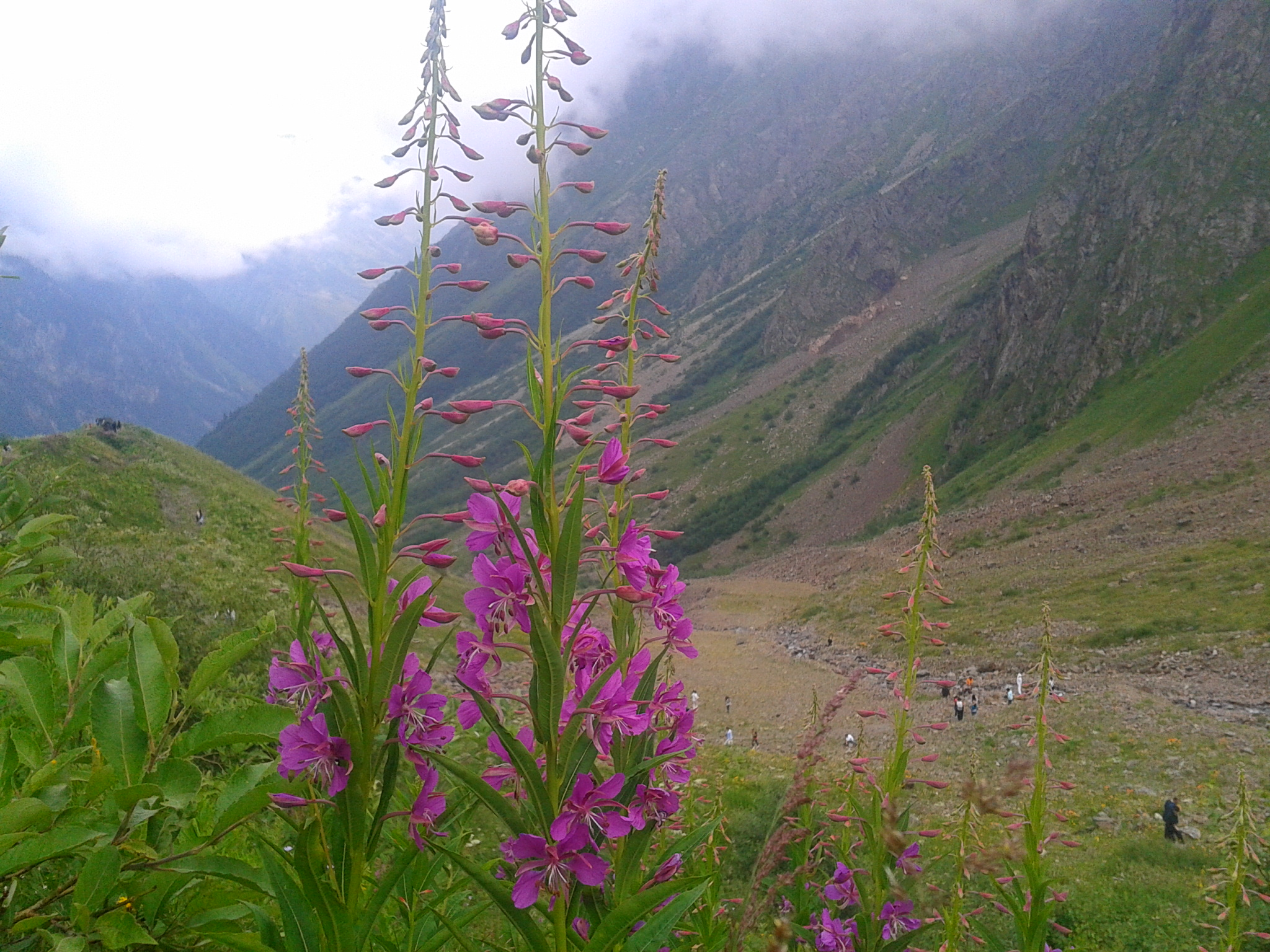 Цей, Алагирский район This image is related to the protected area of Russia number 1510139